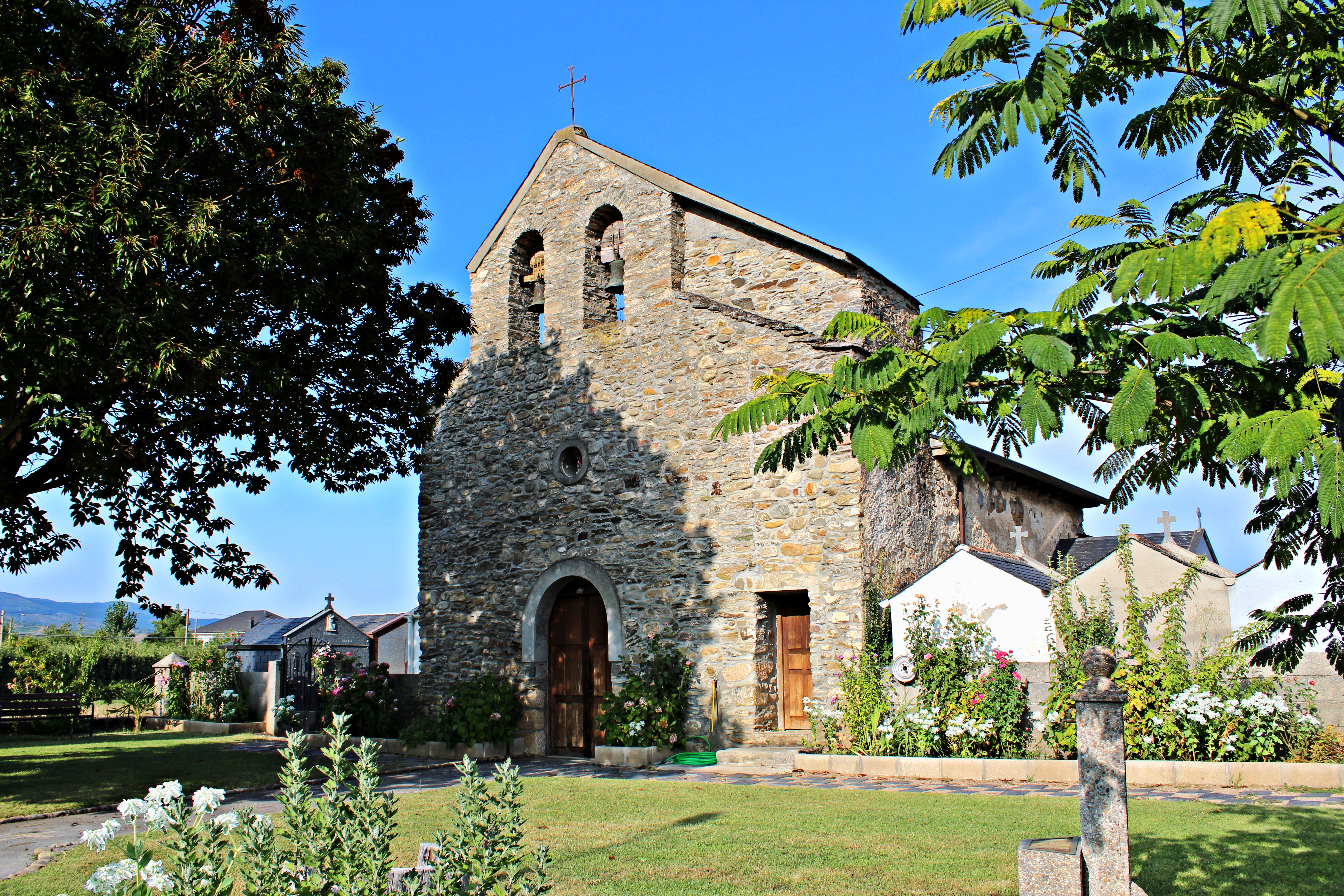 Horta, comarca de El Bierzo, provincia de León